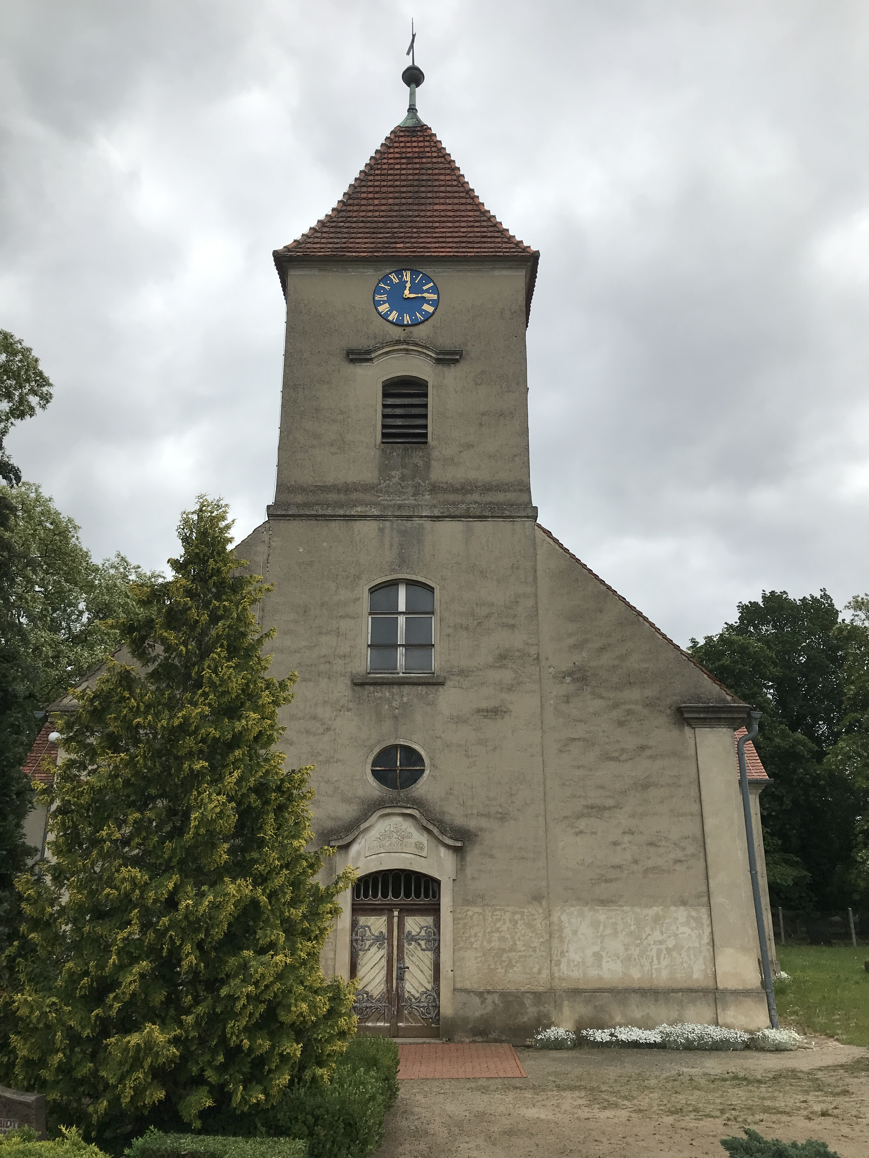 Die Dorfkirche Krahne ist eine Saalkirche im gleichnamigen Ortsteil der Gemeinde Kloster Lehnin im Landkreis Potsdam-Mittelmark in Brandenburg. Im Innern steht unter anderem ein Wappengrabstein, der an den 1741 verstorbenen von Roßkampf erinnert.